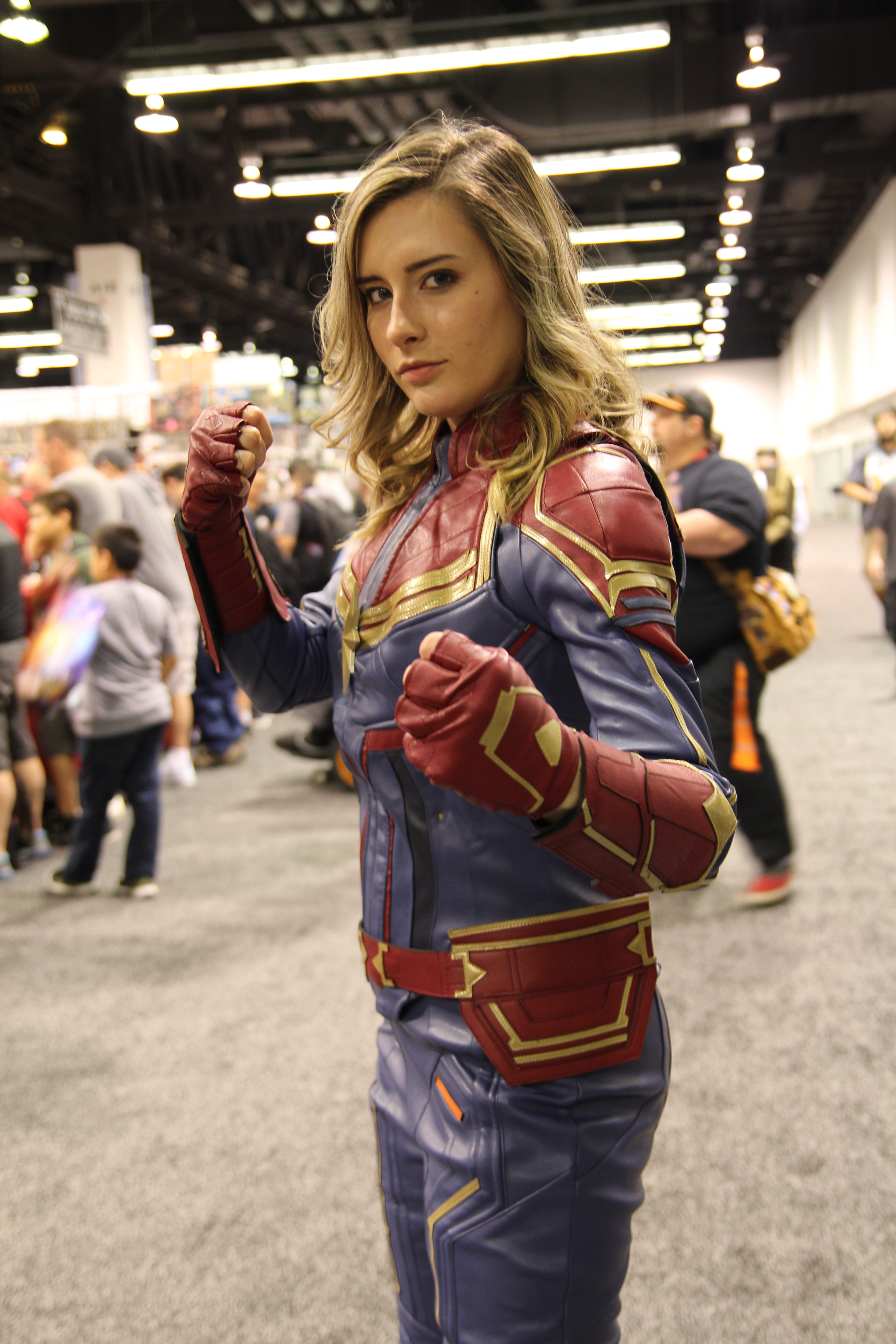 Cosplay of Captain Marvel